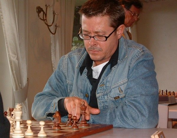 Carsten Hensel beim Schach.